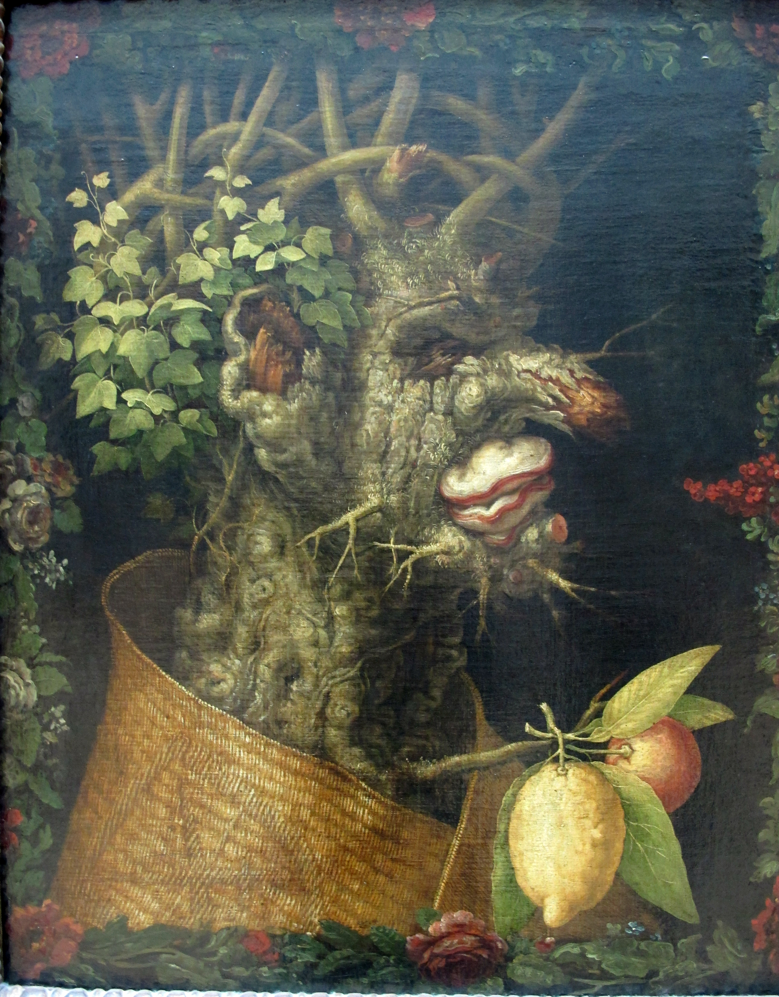 Pittura italiana del XVI secolo, Louvre